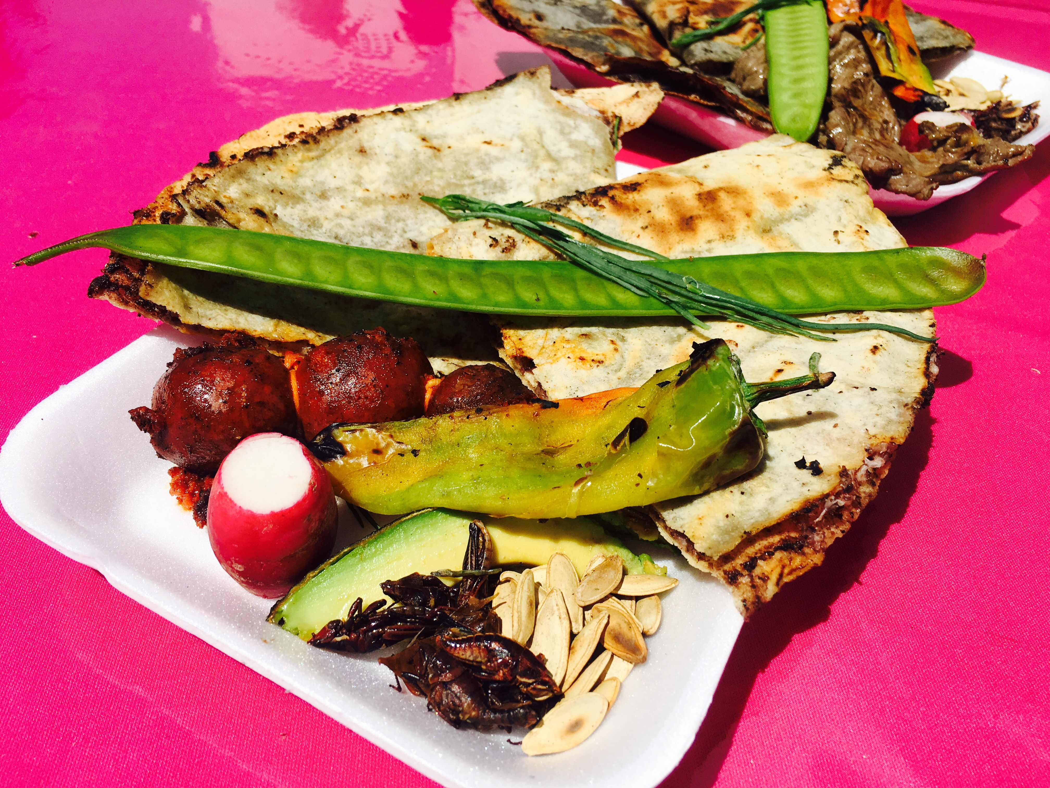 Tlayuda servida con chorizo, tasajo, chapulines, aguacate, chile de agua, chepiche, guajes, rábano, una presentación tradicional del producto estrella Oaxaqueño.